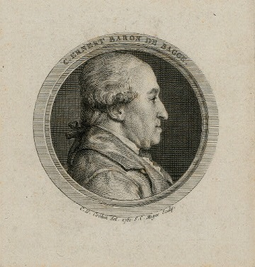 Portrait de Charles. Ernest Baron de Bagge (1718-1791).